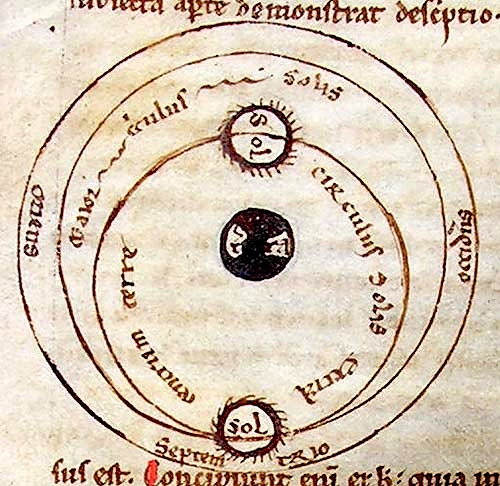 Ilustración del manuscrito «Diálogo contra los judíos» de Pedro Alfonso de Huesca